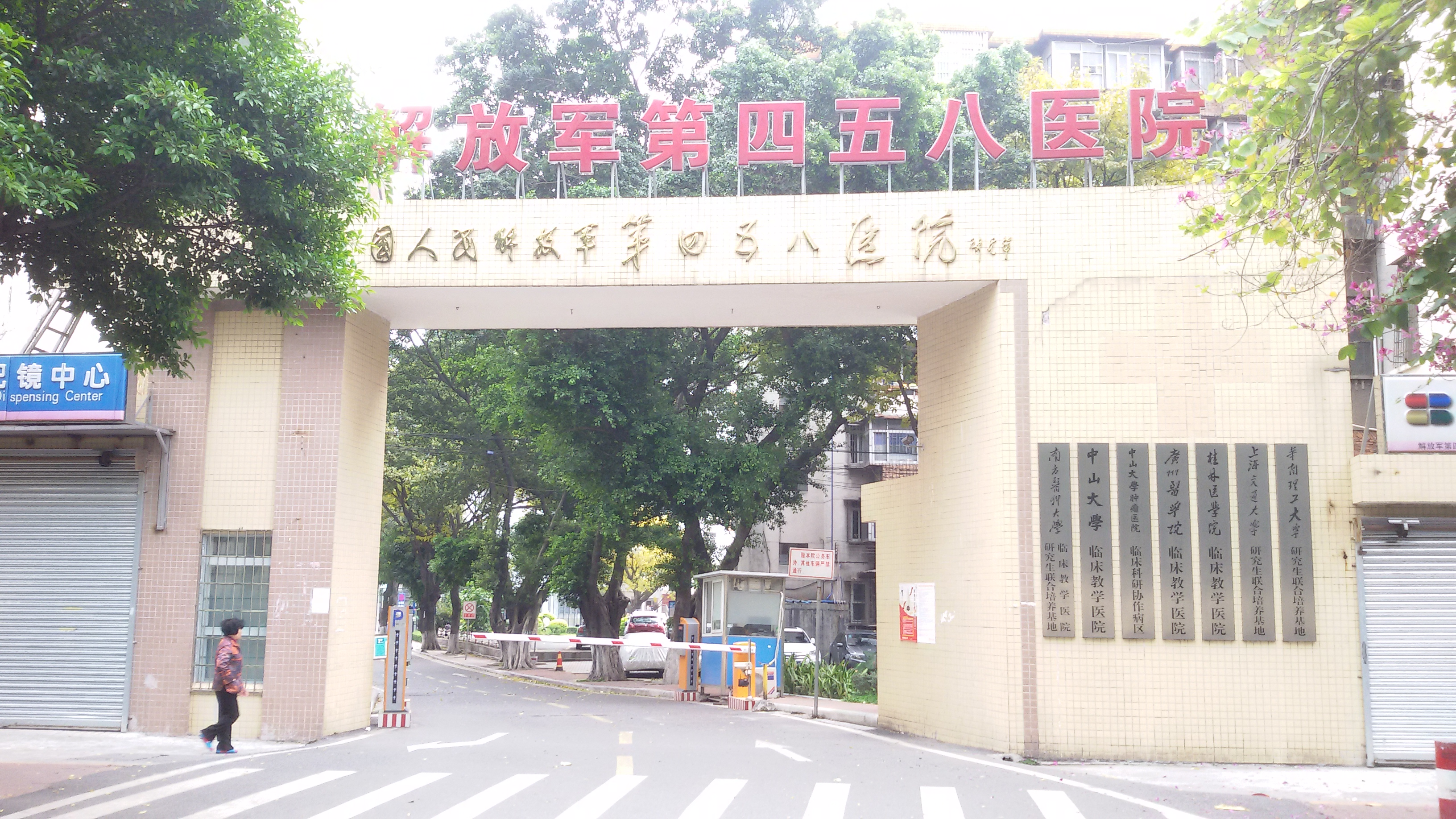 粵語: 中國人民解放軍第四五八醫院嘅北門